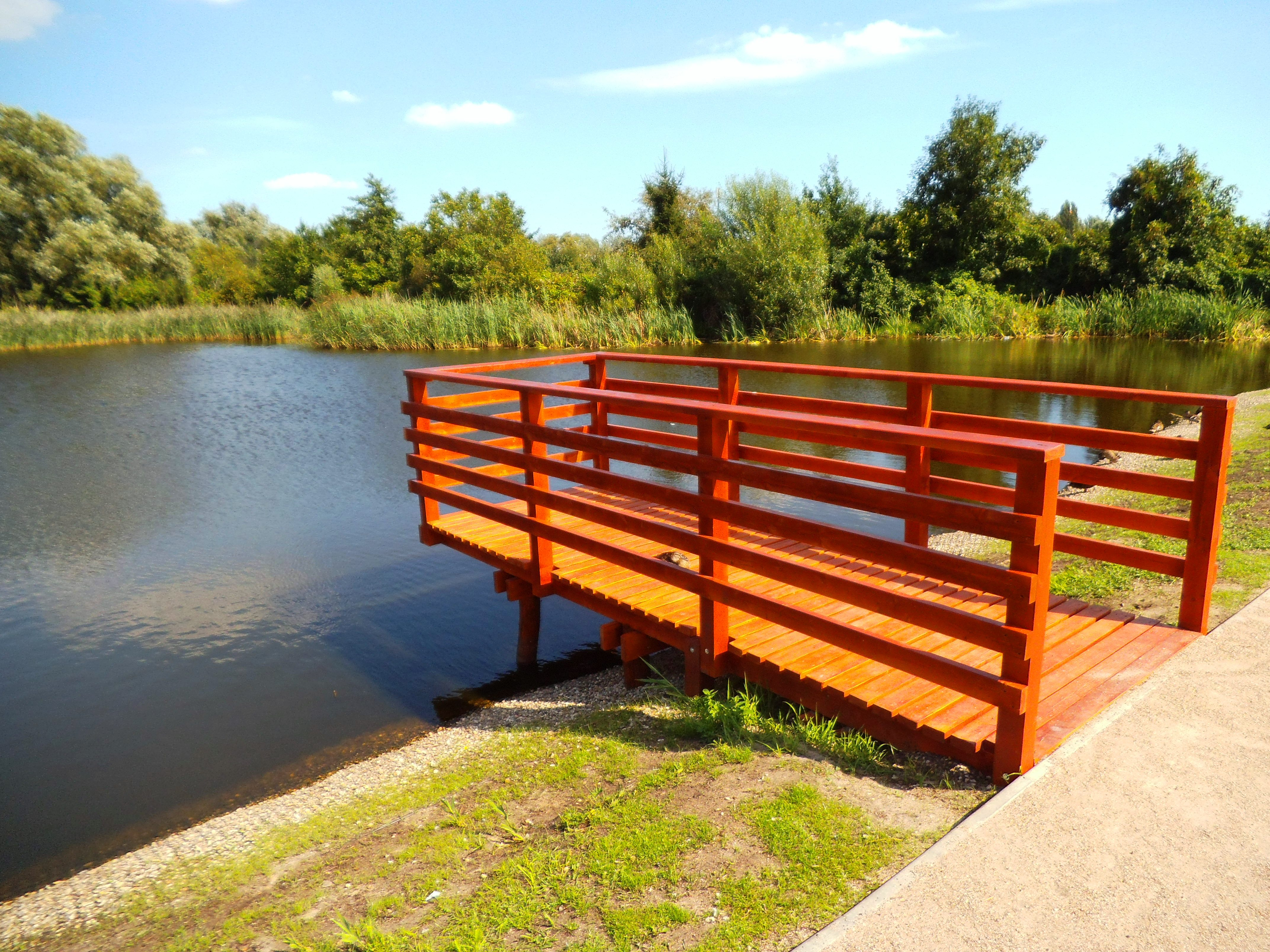 Stawy Mokrzańskie w Toruniu11